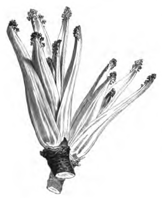 Les plantes potagères. Description et culture des principaux légumes des climats tempérés, 1re édition, ouvrage publié par la maison Vilmorin-Andrieux & Cie à Paris en 1883.